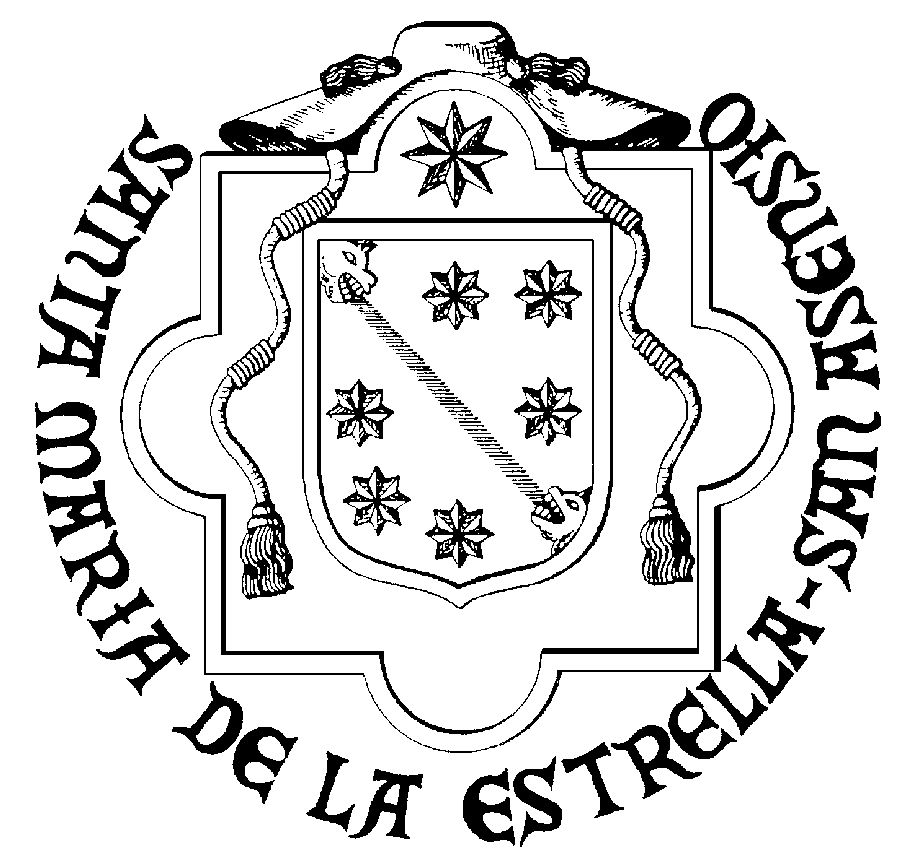 Blasón del Santuario de Nuestra Señora de la Estrella (San Asensio, Spain)